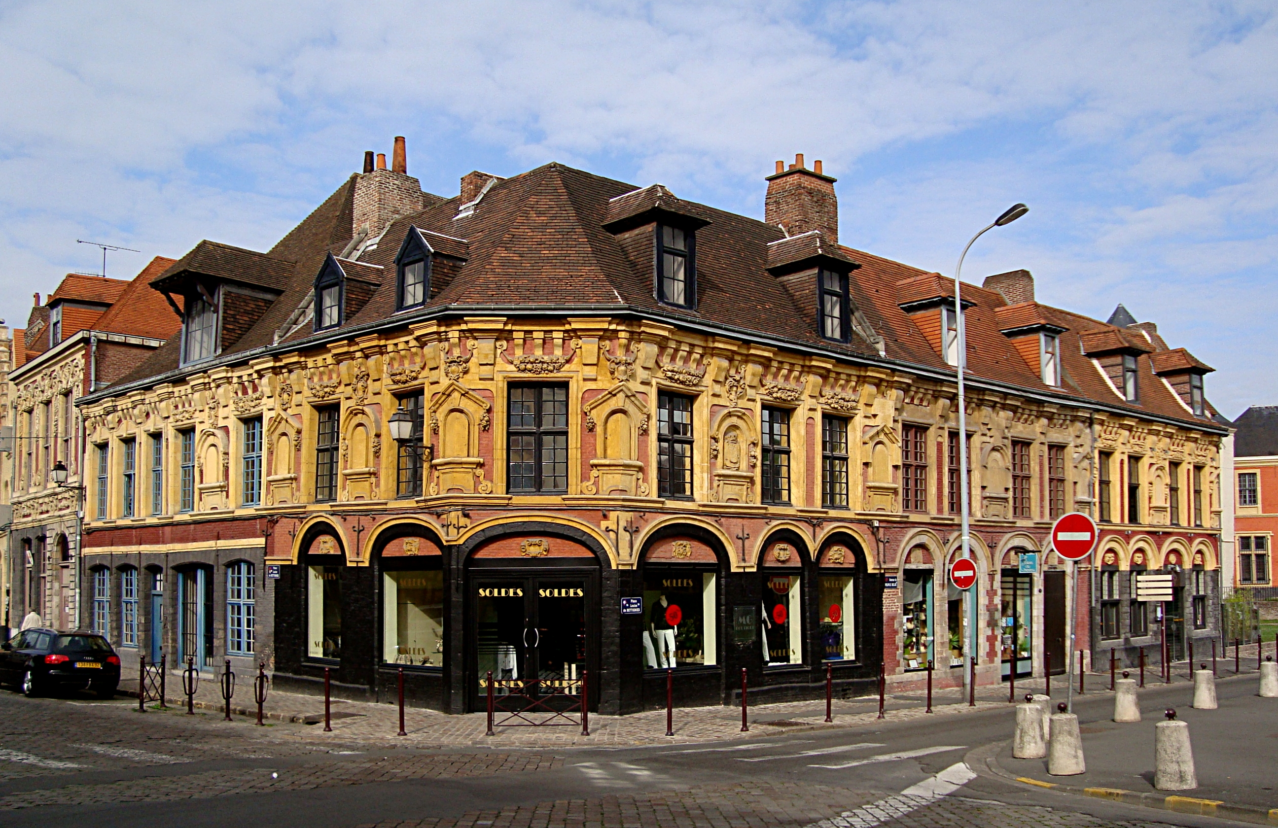 La maison de Gilles de le Boë, construite en 1636, à Lille (Nord).